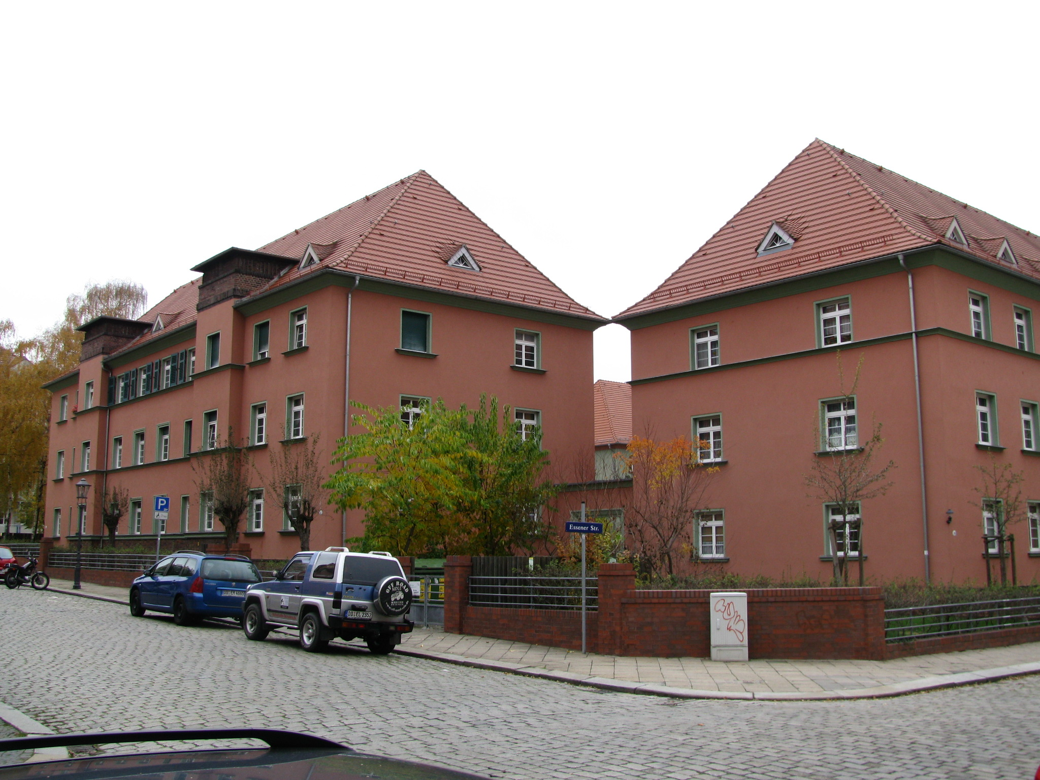 Essener Straße Ecke Deubner Straße